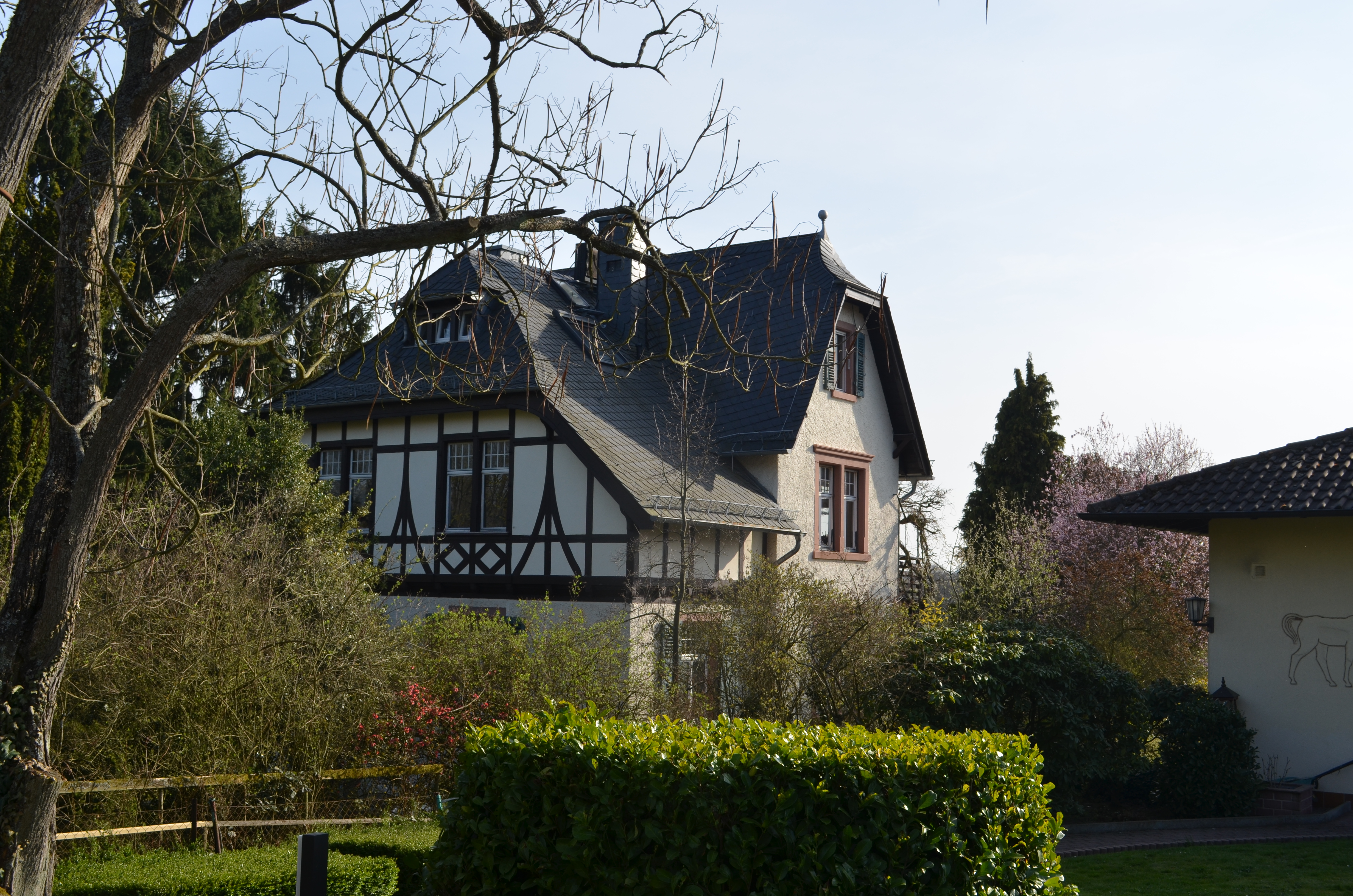 Kronberg, Wilhelm-Born-Straße 42.